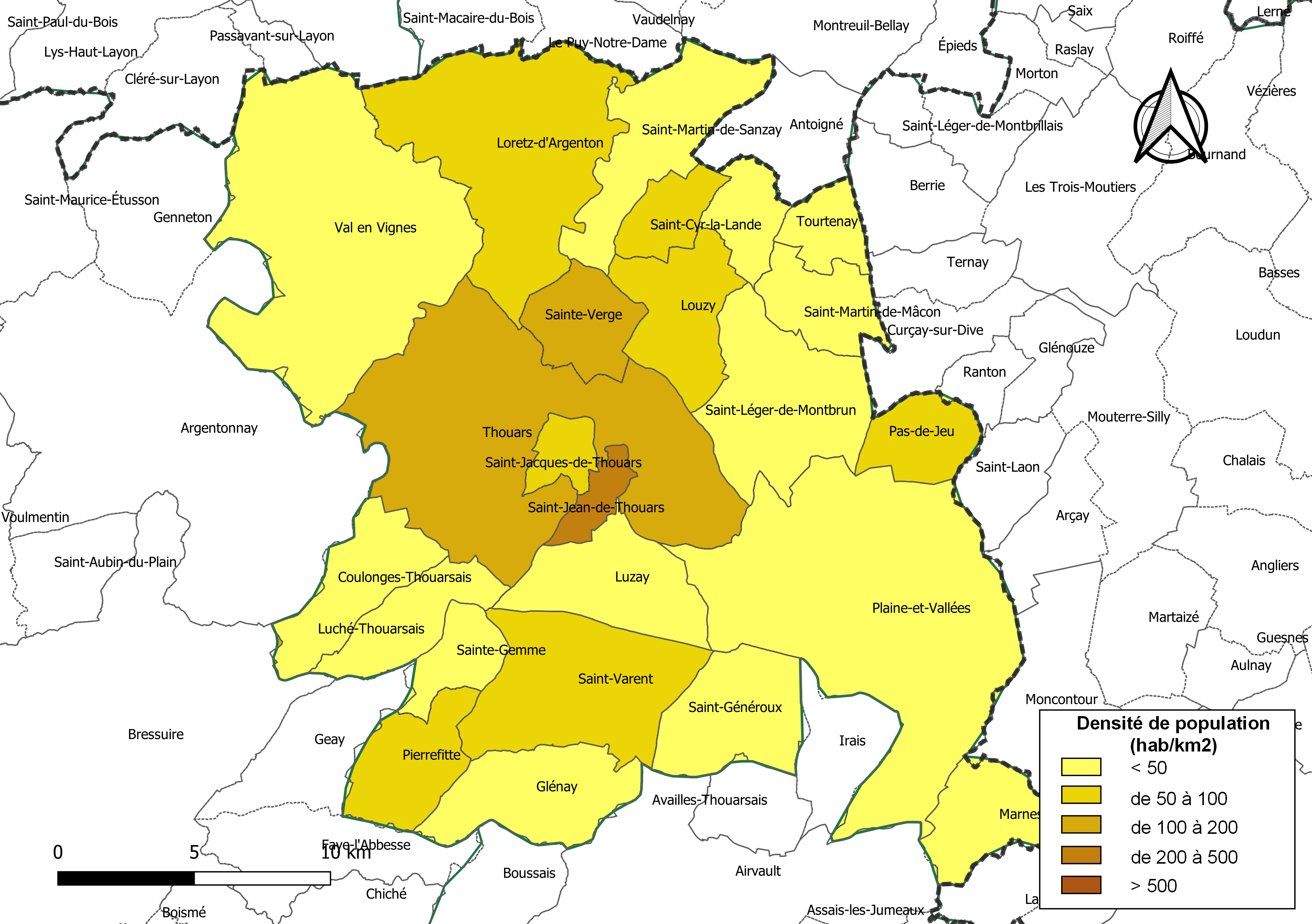 Carte des densités de population (millésimée 2016) des communes de la Communauté de communes du Thouarsais, département des Deux-Sèvres, France. Composition au 1er janvier 2019.